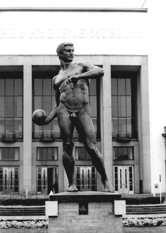 Dresden, Statue ADN-ZB Hiekel 3.1.1984 Dresden: Der "Ballwerfer", 1907 von Richard Daniel Fabricius geschaffen, hat seinen festen Platz vor dem Deutschen Hygiene-Museum gefunden. Nachdem das Kunstwerk im Zweiten Weltkrieg beschädigt wurde und in den vergangenen zwei Jahren in der Kunstschmiedewerkstatt Peter Bergmann restauriert werden konnte, hat es diesen neuen Standort erhalten.